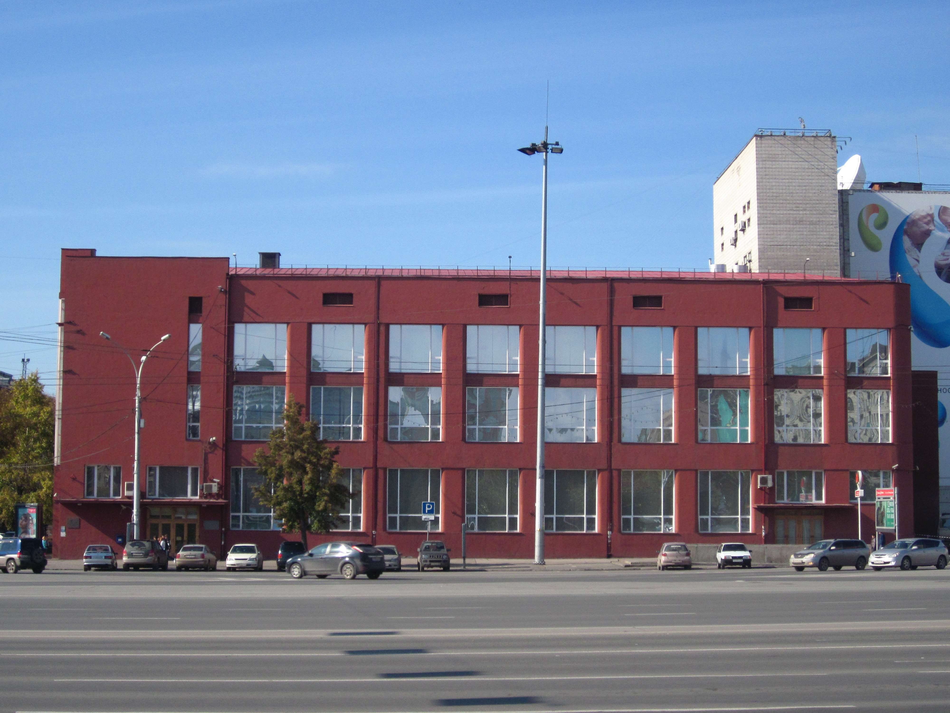 Госбанк Красный проспект, 27. Архитектор А.Д. Крячков